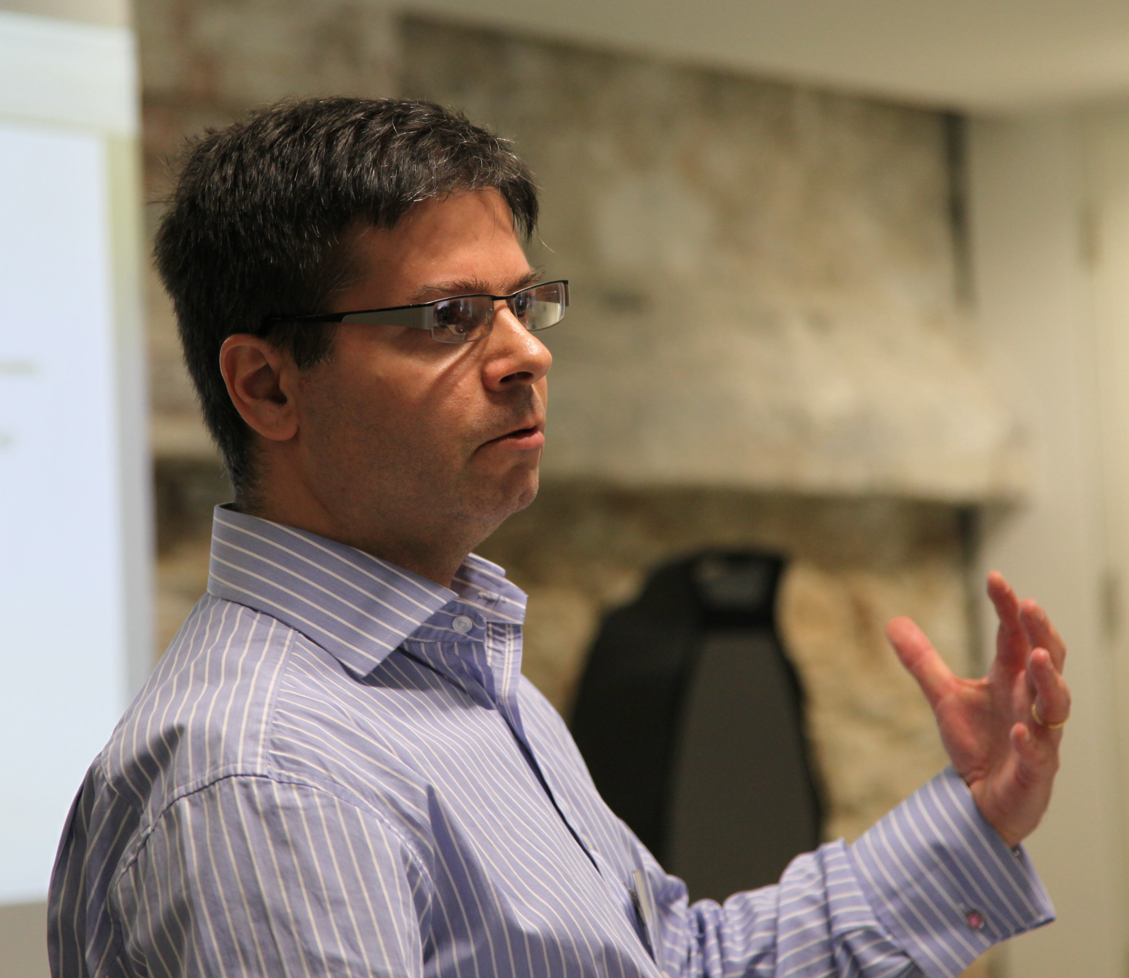 Eduardo Reck Miranda